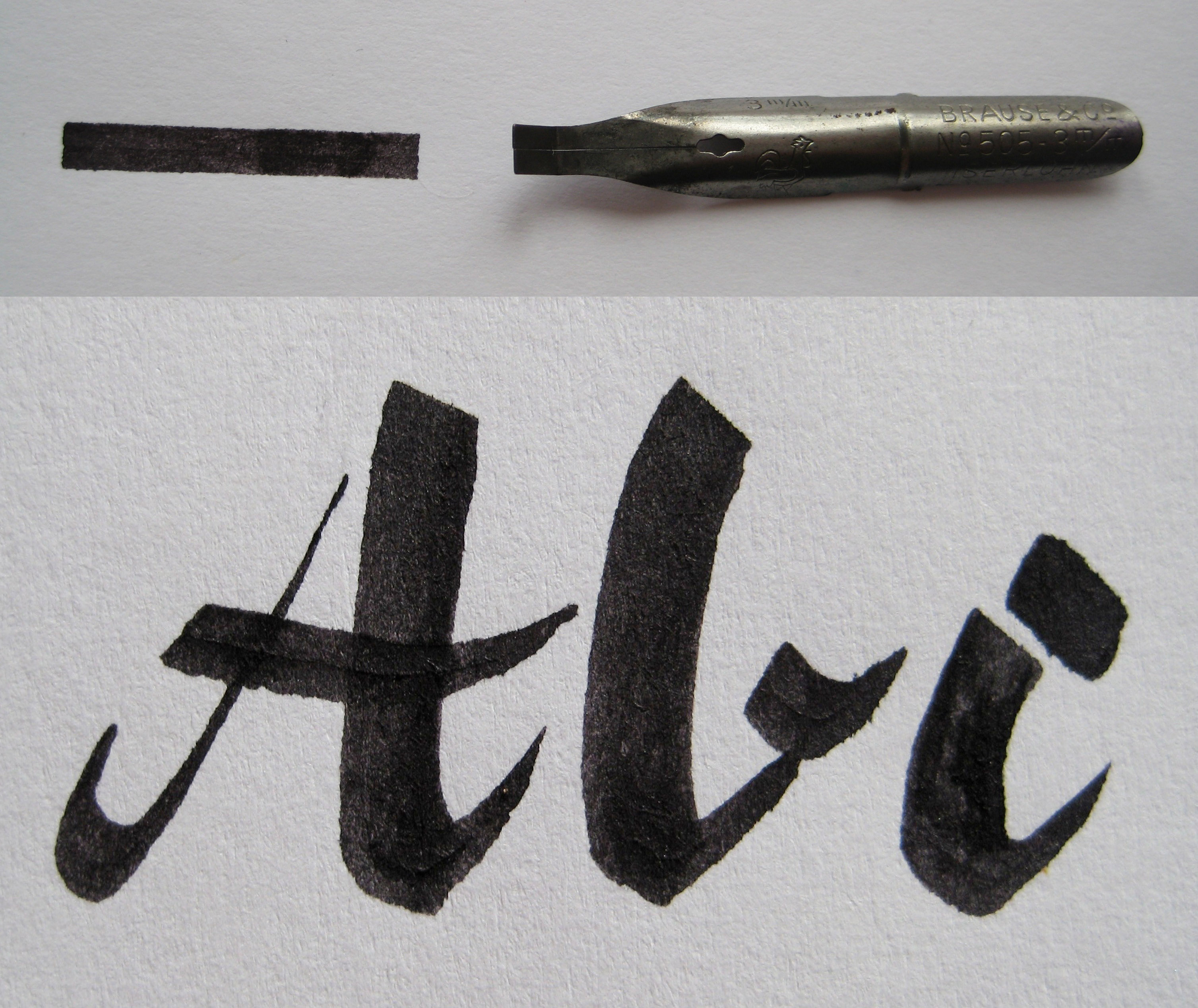 Rechteckplattenfeder mit Strich und Schriftbeispiel